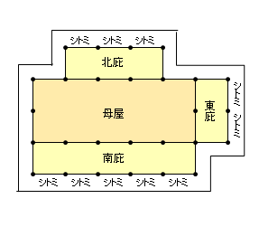 尼証摂の家。太田博太郎「日本住宅史」より作成。